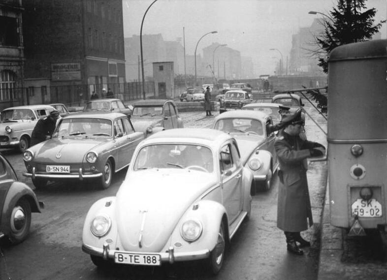 Zentralbild Brüggmann Ga-Qu 28.12.1963 Besucherandrang wie am ersten Weihnachtsfeiertag Einen Besucherstrom gleich dem des ersten Weihnachtsfeiertages verzeichneten am 28. Dezember mehrere Übergangsstellen für Westberliner schon in den Vormittagsstunden. Bei allem Andrang ging die Abfertigung wieder schnell und reibungslos vonstatten. So war es auch am Kontrollpunkt Chausseestraße, dessen Mitarbeiterzahl ebenso stark war, wie an den vergangenen Feiertagen. UBz: Schnell und reibungslos geht die Abfertigung der Personenkraftwagen vor sich.